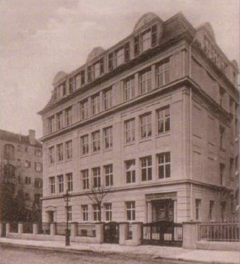 Hölderlin-Gymnasium Stuttgart, 1912. (Damals noch Königin-Charlotte-Gymnasium).